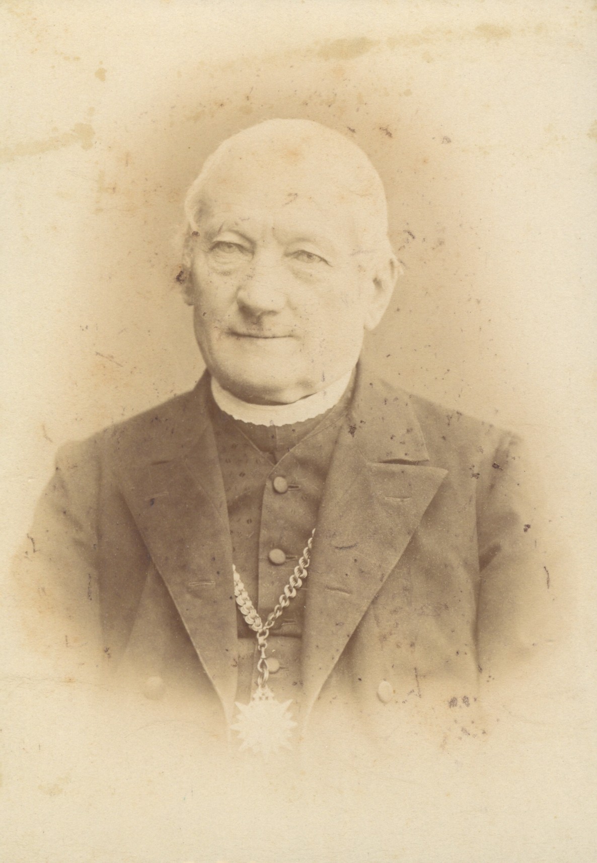 Libochovický děkan Karel Kerka kolem roku 1890.